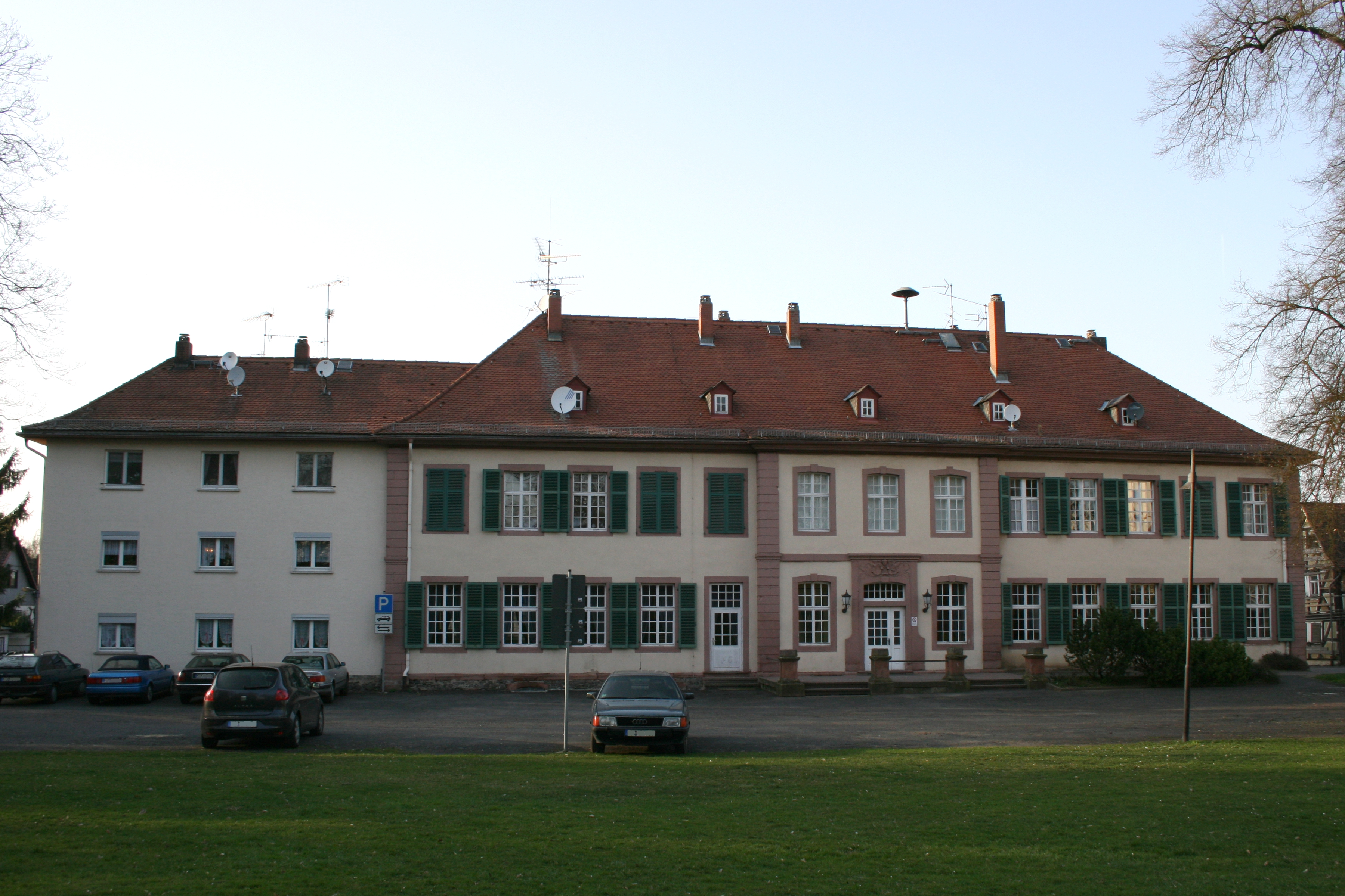 Löw'sches Schloss in Florstadt-Staden, Wetteraukreis, Hessen.